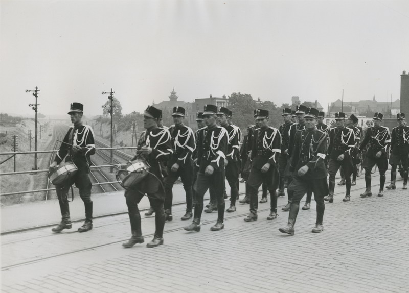 Een detachement van de Koninklijke Marechaussee op het spoorwegviaduct in de St. Annastraat op de eerste dag van de 27e Vierdaagse. Op de achtergrond het missiehuis Bisschop Hamer.